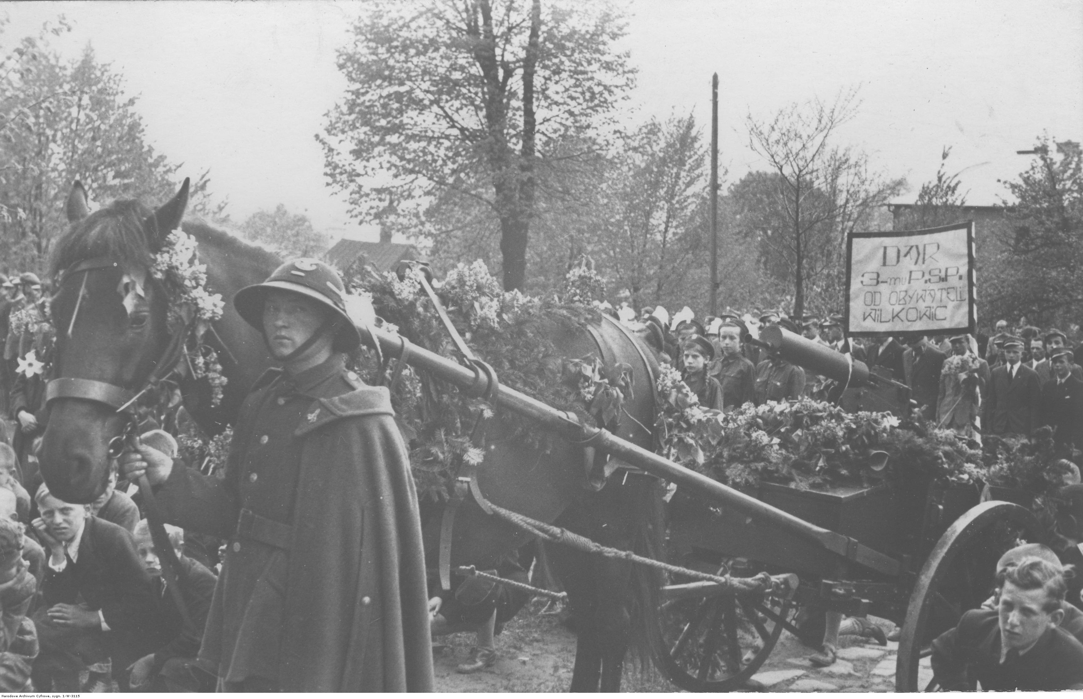 Przekazanie 3 Pułkowi Strzelców Podhalańskich trzech ciężkich karabinów maszynowych przez ludność Wilkowic. Strzelec Pułku przy przy ckm 7,92 mm Browning wz. 1930 na biedce piechoty. Koncern Ilustrowany Kurier Codzienny - Archiwum Ilustracji. Sygnatura: 1-W-3115